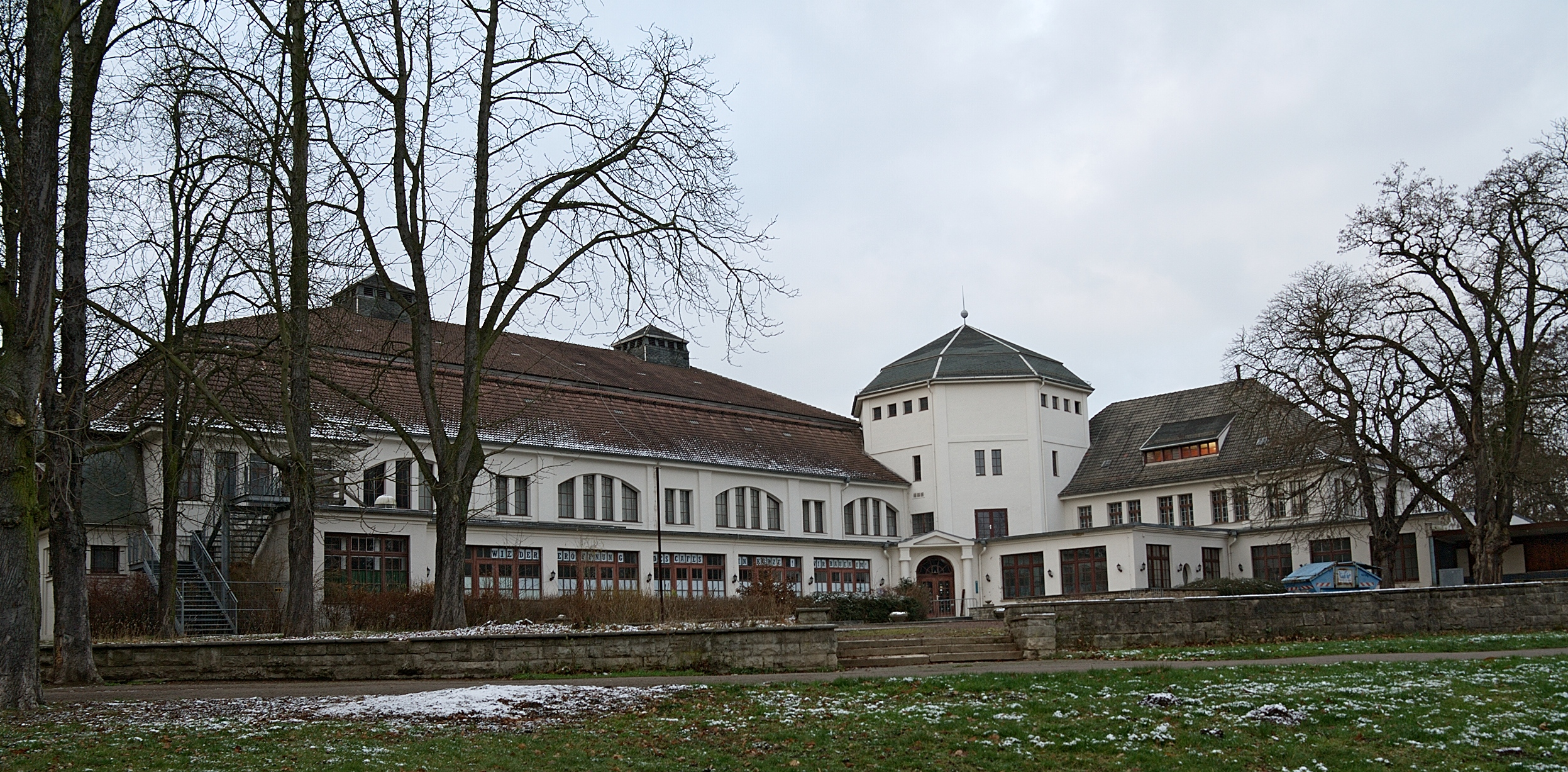 Das Haus Auensee in Leipzig-Wahren.